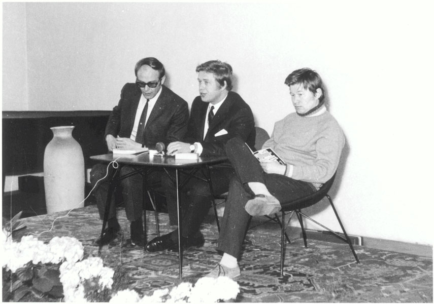 Václav Havel a Václav Sloup - autorské čtení v PNP, 1969